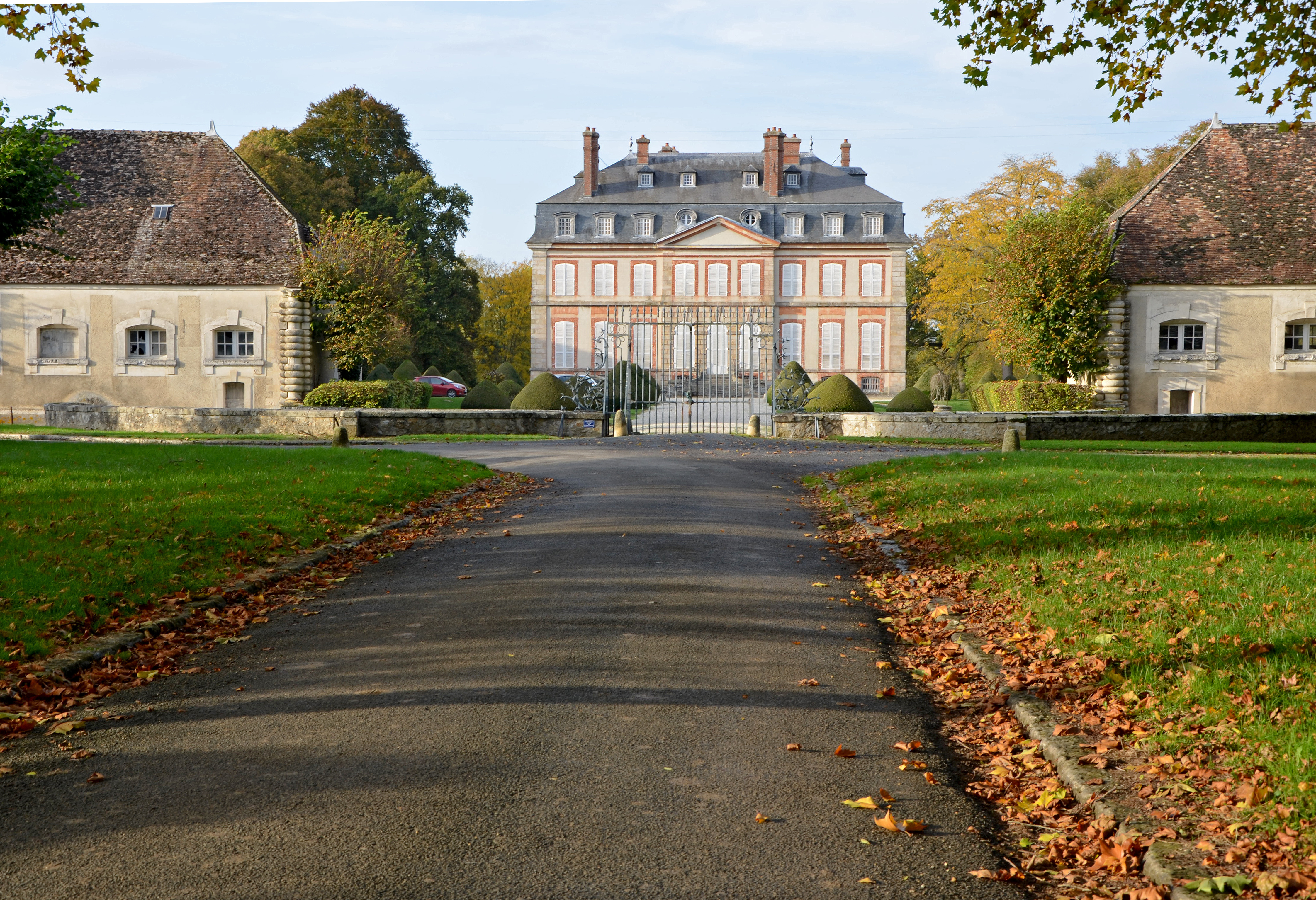 Chateau de Noyen-sur-Seine (Seine-et-Marne, Ile de France)